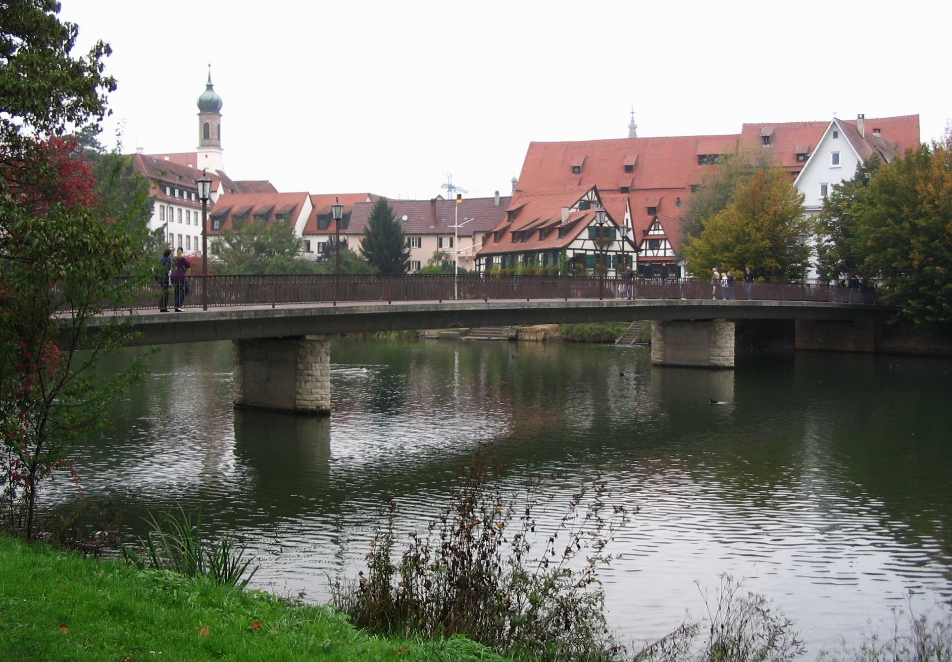 Sulzauer Hof in Rottenburg am Neckar